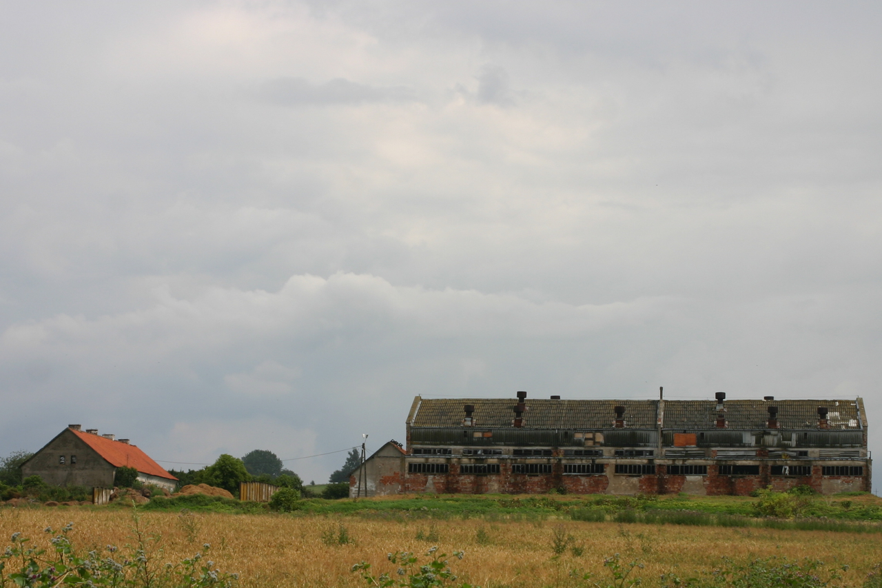 Kąty, Polska, powiat kętrzyński.